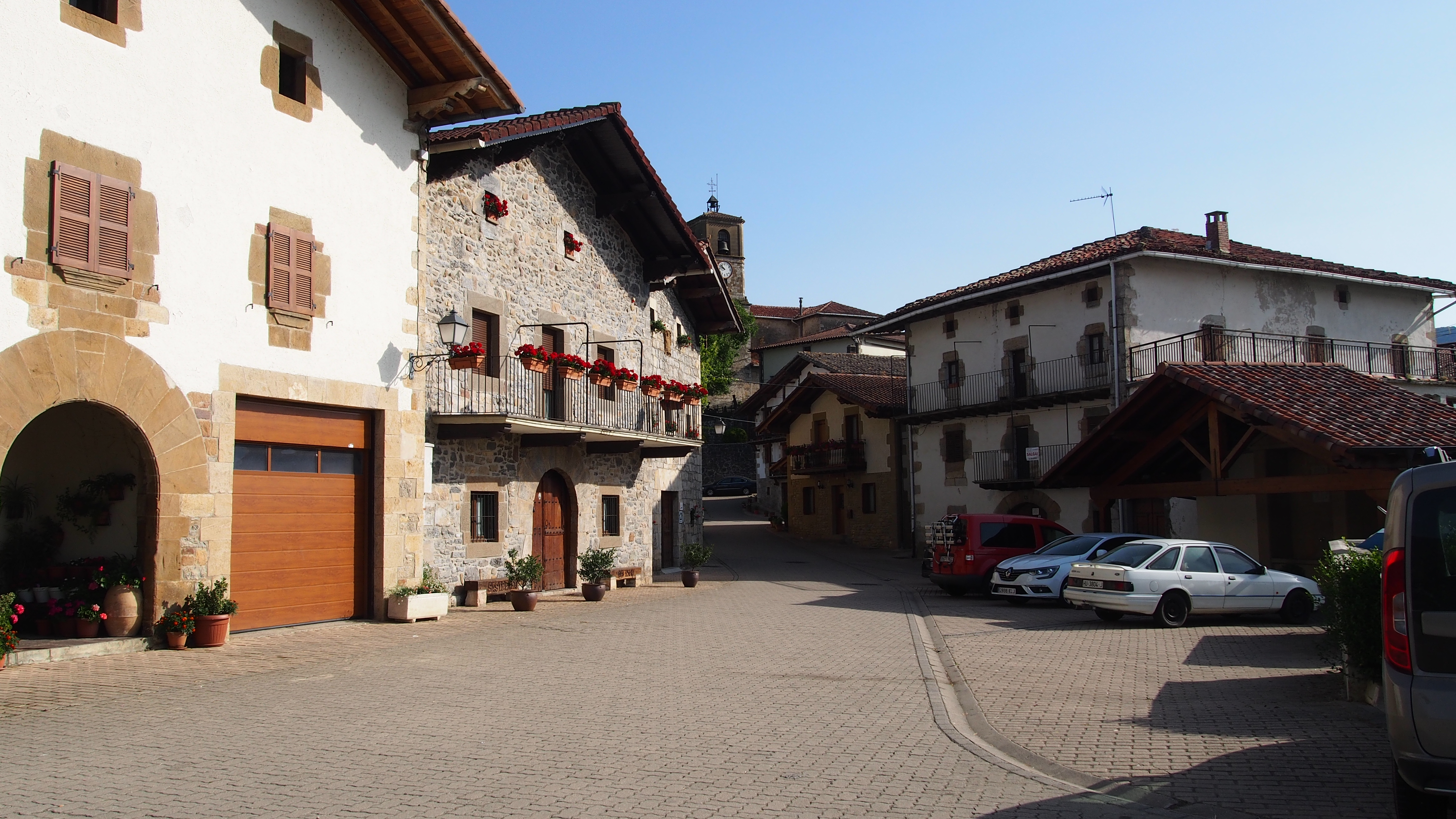 Lizasoko kale bat